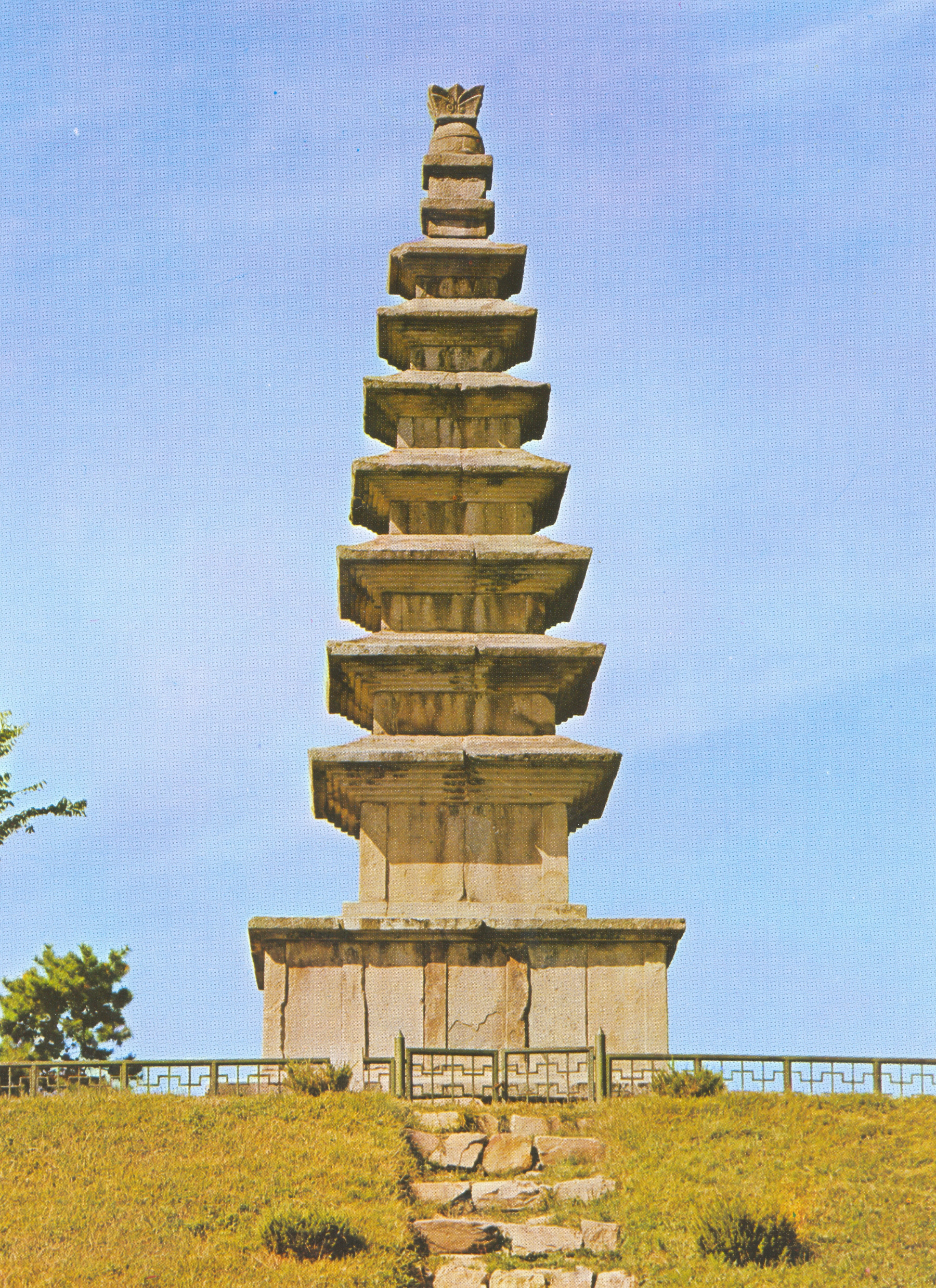 대한민국의 국보 제6호 중원 탑평리 칠층석탑(忠州 塔坪里 七層石塔)